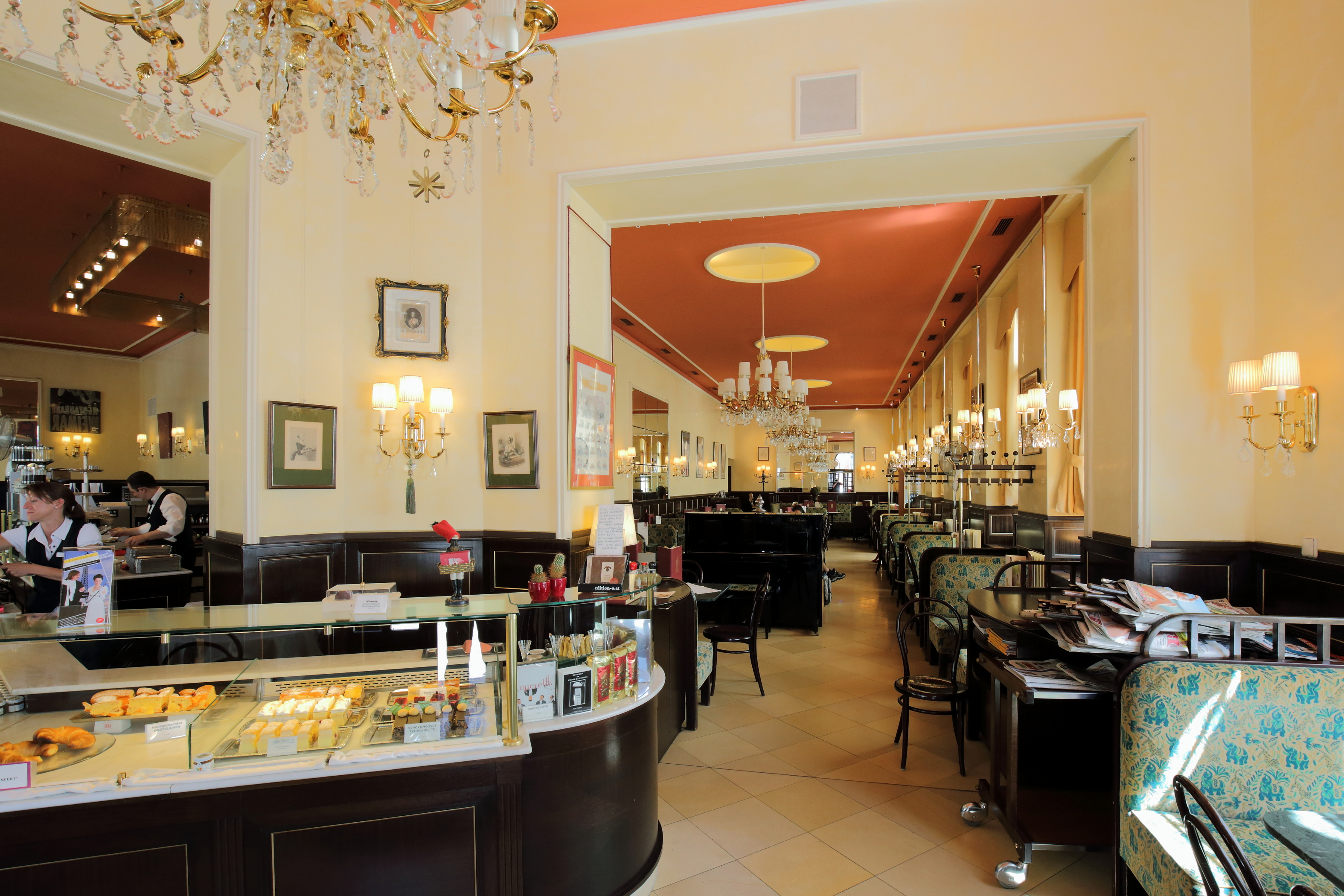 Innenansicht des Cafés Weimar an der Adresse Währinger Straße 68 im 1. Bezirk der Bundeshauptstadt Wien.